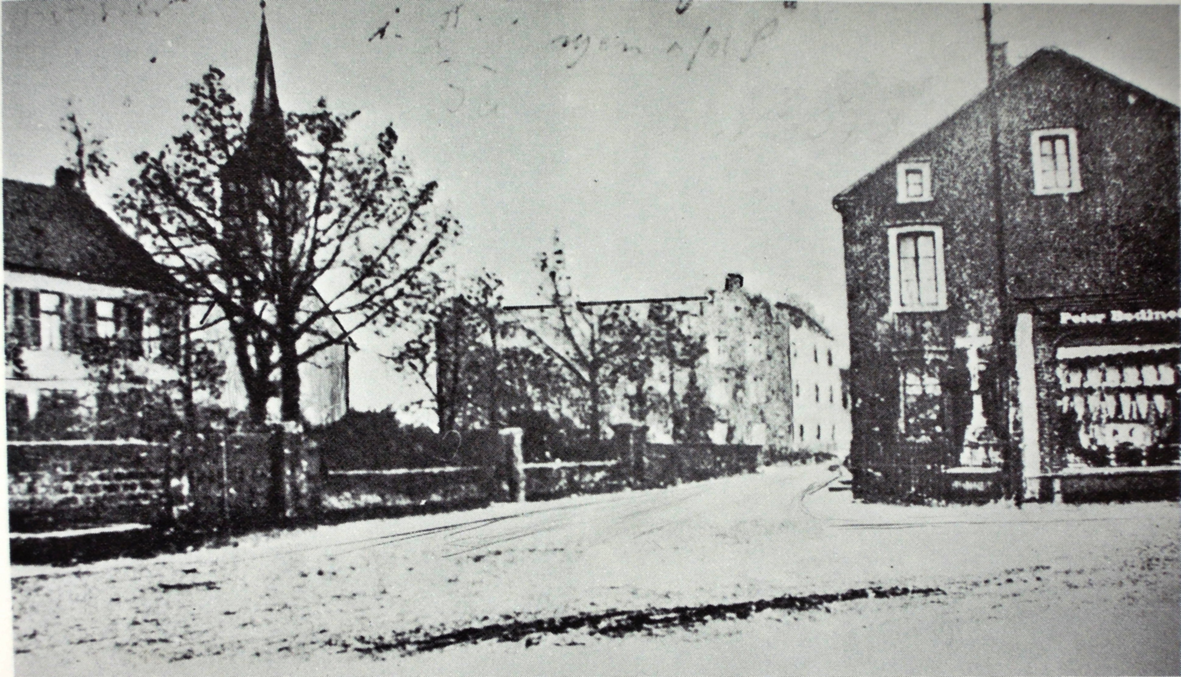 von links: Altes Pfarrhaus (die spätere Gastronomie Johanneshof), Kirche St. Johann, das dritte Schulhaus von 1864 (das erste von 1792 stand in der Hinterstraße), Haus Bodinet mit Kreuz